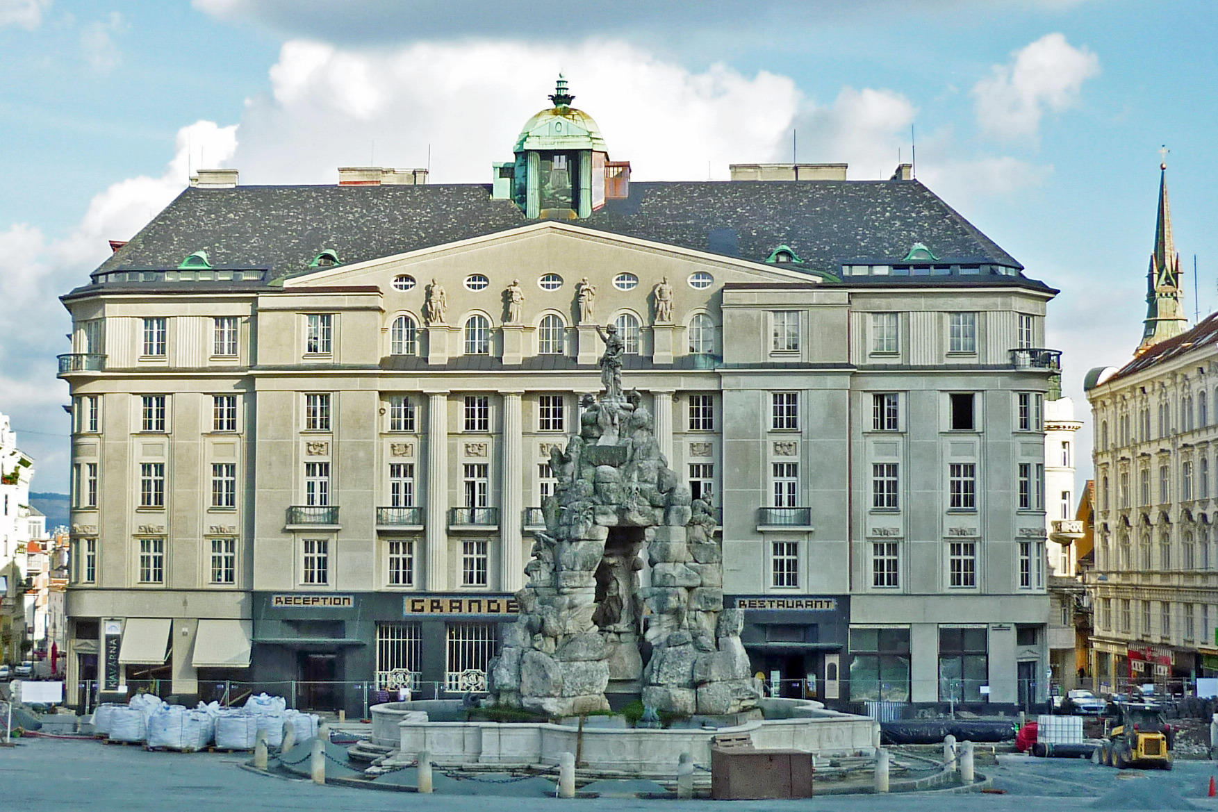 Grandezza-Hotel am Krautmarkt in Brünn (Brno)